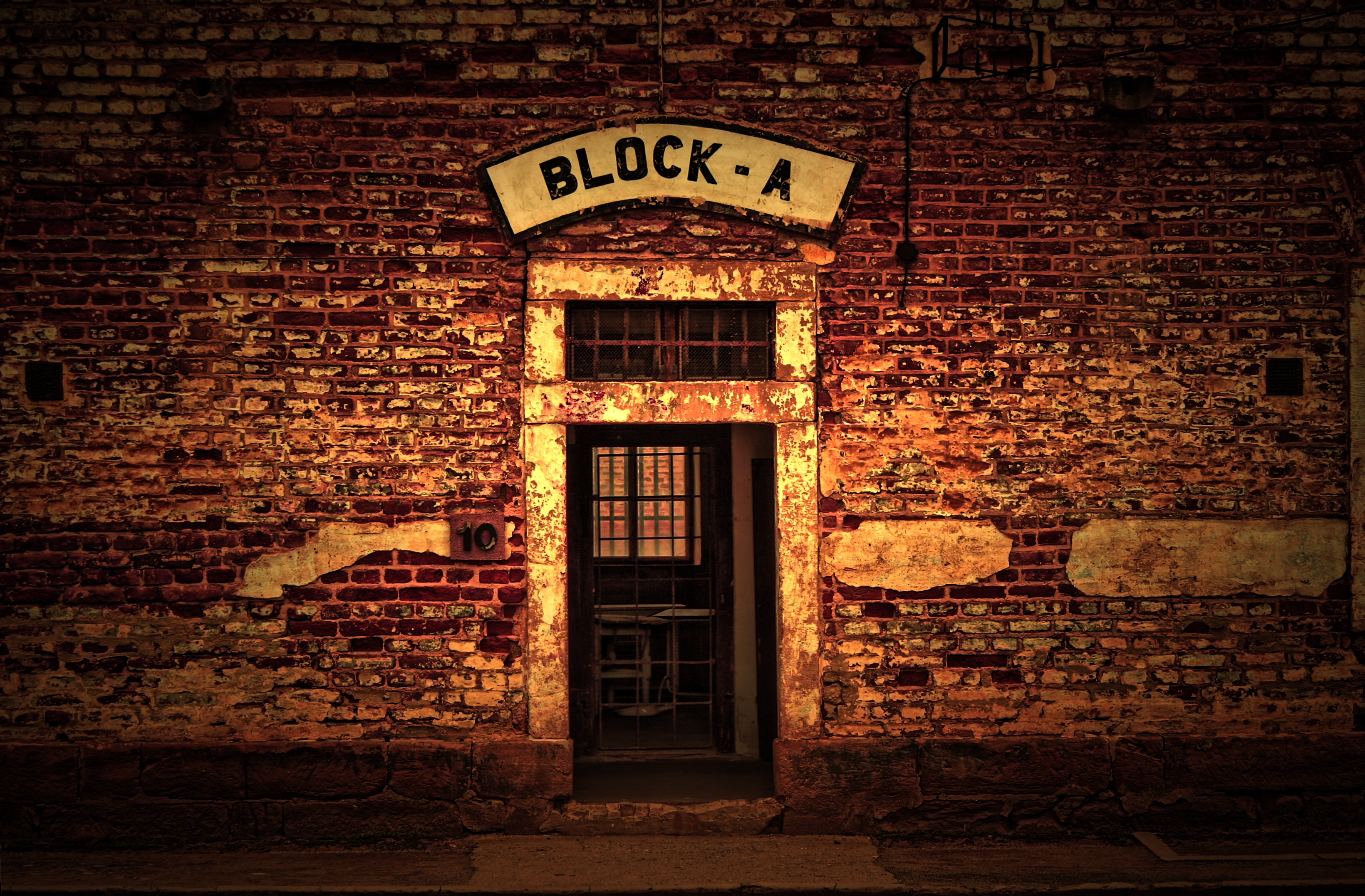 Eingang zum Block A